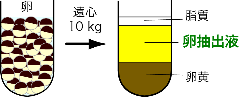 カエル卵を試験管に詰め、遠心分離すると、卵抽出液が得られる。